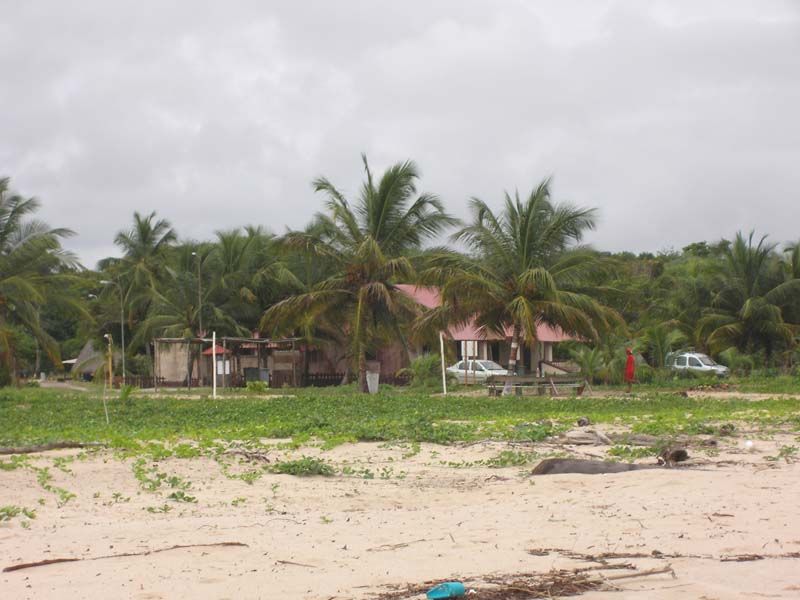 Village de Yalimapo depuis la plage des Hattes Awala-Yalimapo, Guyane.